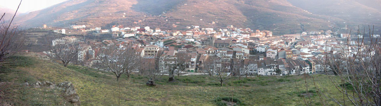 Cabezuela del Valle